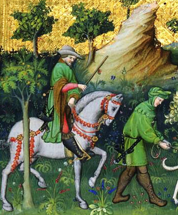 Сцена охоты на оленя. Миниатюра из "Книги охоты Гастона Феба" (оригинальное произведение написано в 1387—89 гг.), 1405—10 гг.